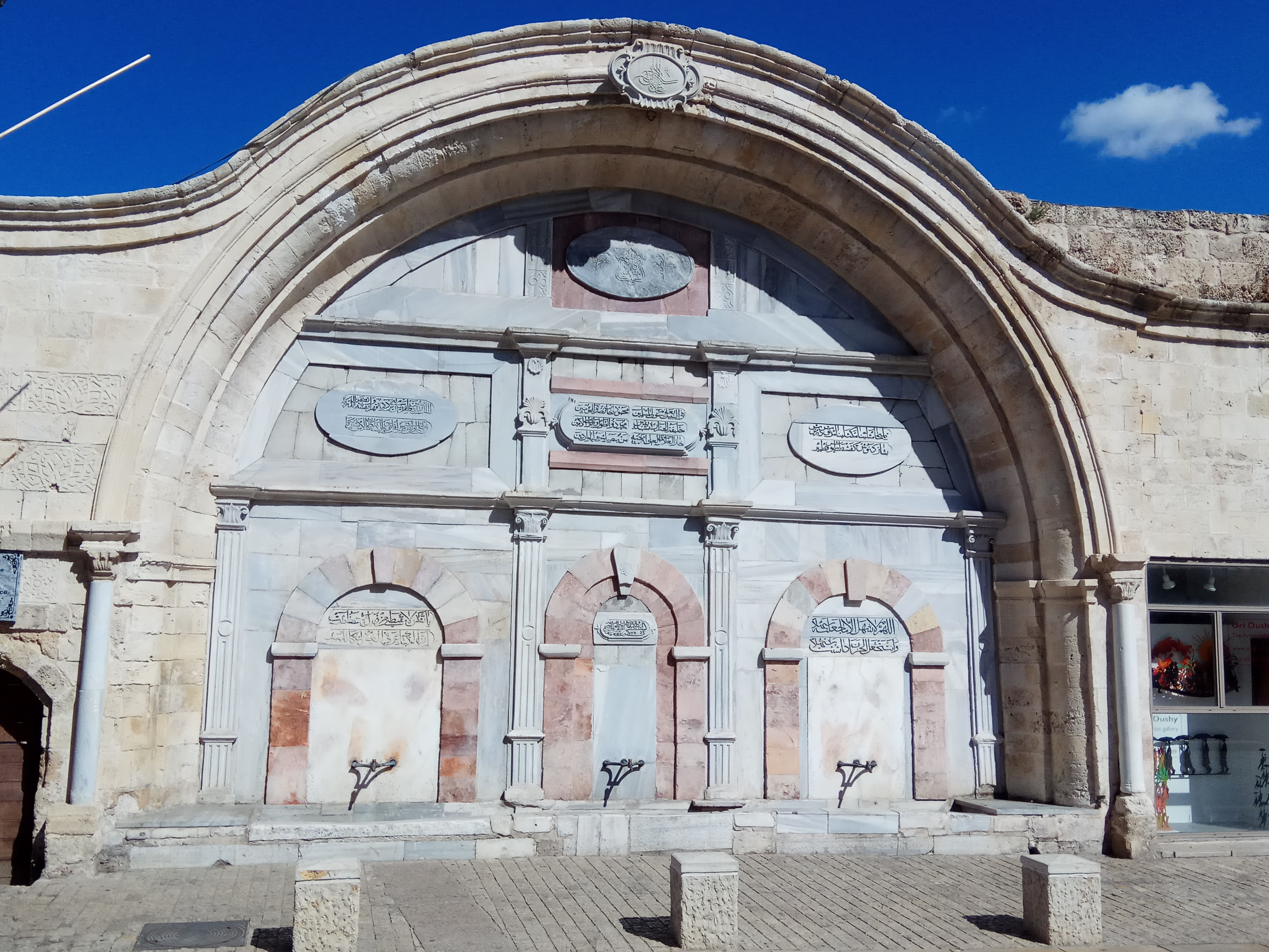 סביל סולימאן ביפו העתיקה